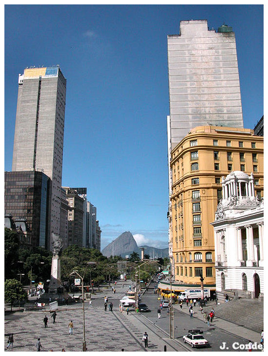 Cinelandia Square in Rio de Janeiro